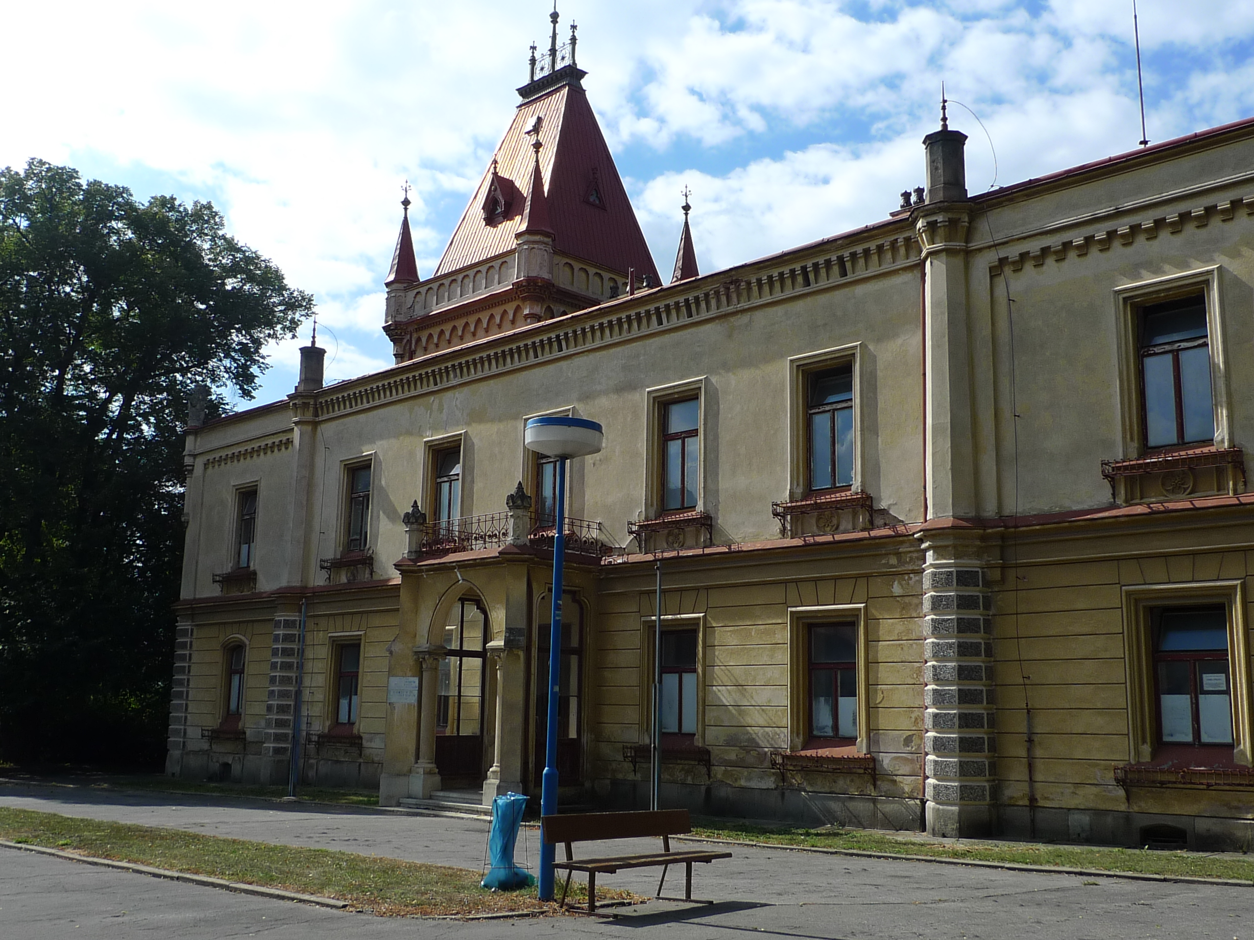 Zámek Přílepy- vstup